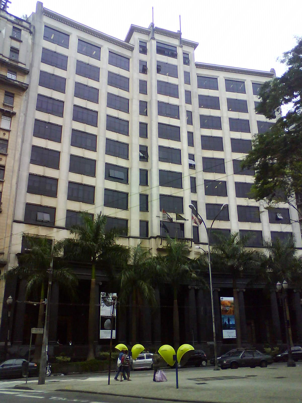 Conjunto Cultural da Caixa (Museu da Caixa Econômica Federal), em São Paulo, Brasil.